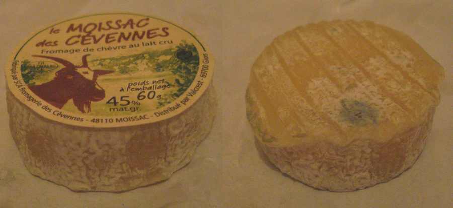 pélardon cévenol fabriqué à moissac (lozère)